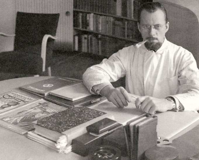 Ralph Lysell på sitt kontor 1945